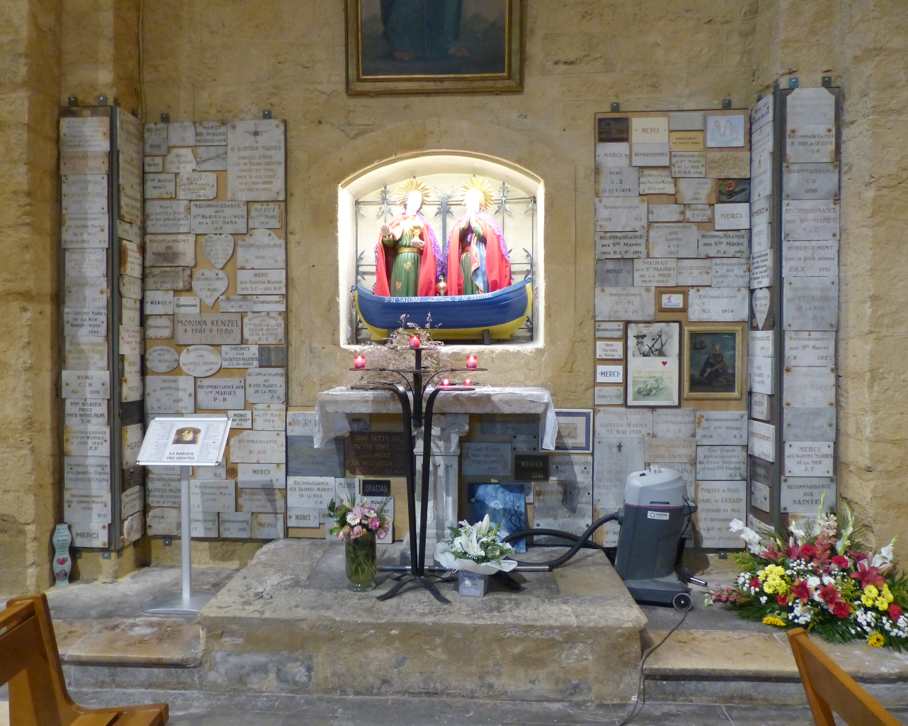 Saintes-Maries-de-la-Mer (Bouches-du-Rhône, France), église Notre-Dame-de-la-Mer, dont l'intérieur a été intégralement restauré entre le 1er septembre 2015 et le 30 avril 2016.